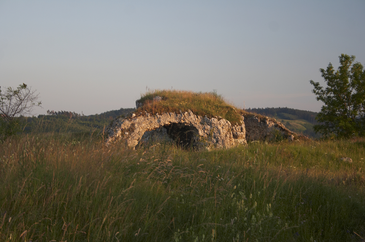 Malá Skalka / Drásovský kopeček